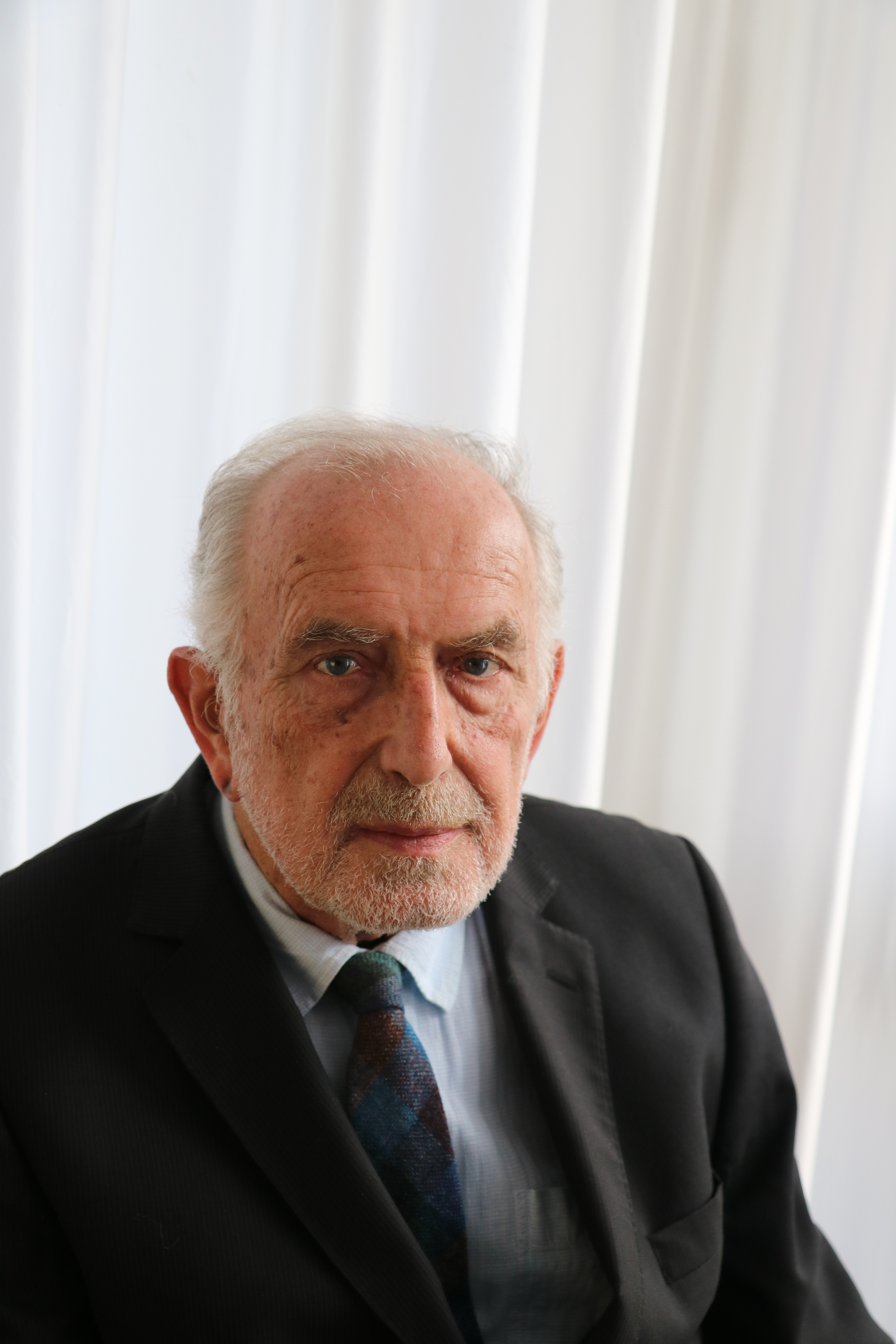 Prof. Dr. Hartmut Redlich (*19. September 1943 in Wreschen)